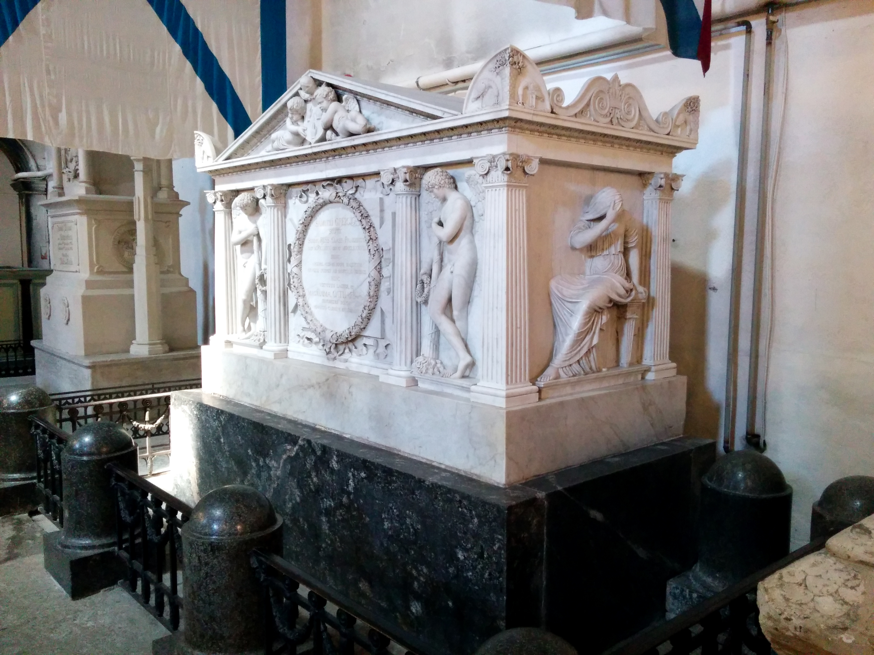 Samuel Greighi hauamonument Tallinna Toomkirikus